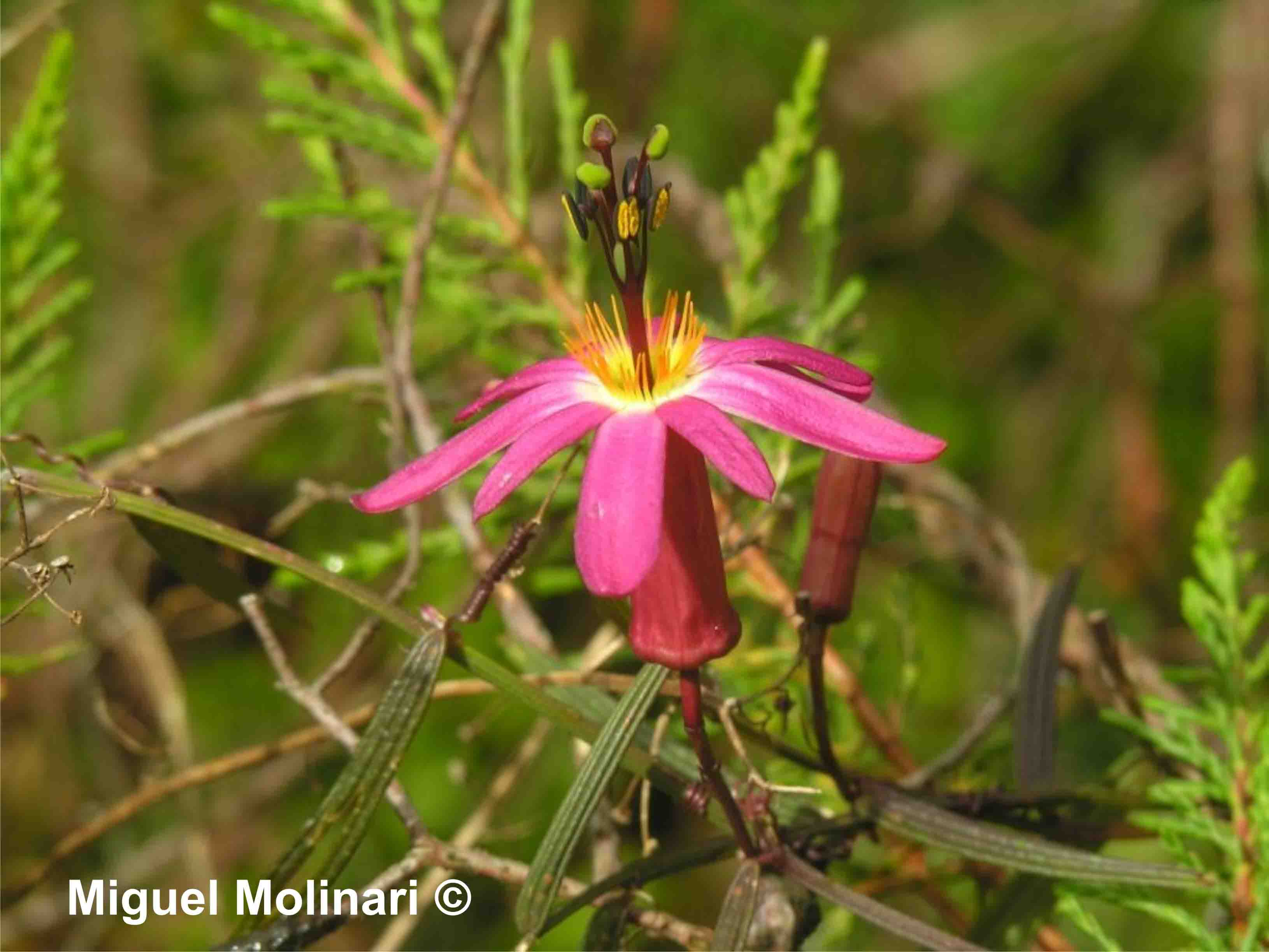 Passiflora hyacinthiflora Planch. & Linden (Subgénero Decaloba - Psilanthus sensu Killip). Especie endémica de Colombia, distribuida en la cordillera oriental entre los 2.500 y 3.500 m.s.nm. Fotografía tomada en el municipio de Arcabuco (Boyacá)